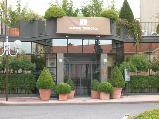 Maison Troisgros Roanne